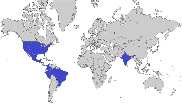 Cinépolis opera en 11 países alrededor del mundo, los cuales son: EEUU, Perú, India, Guatemala, El Salvador, Colombia, Brasil, Panamá, Costa Rica, México (sede) y Honduras.